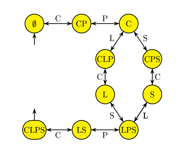 ChèvreLoupSalade